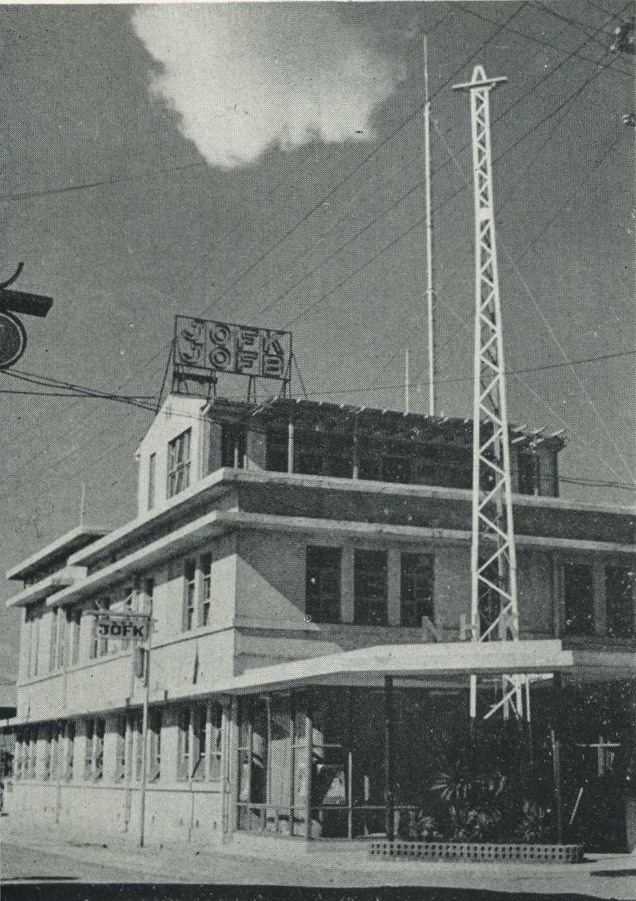 NHK広島中央放送局。現在の中区幟町にあった。